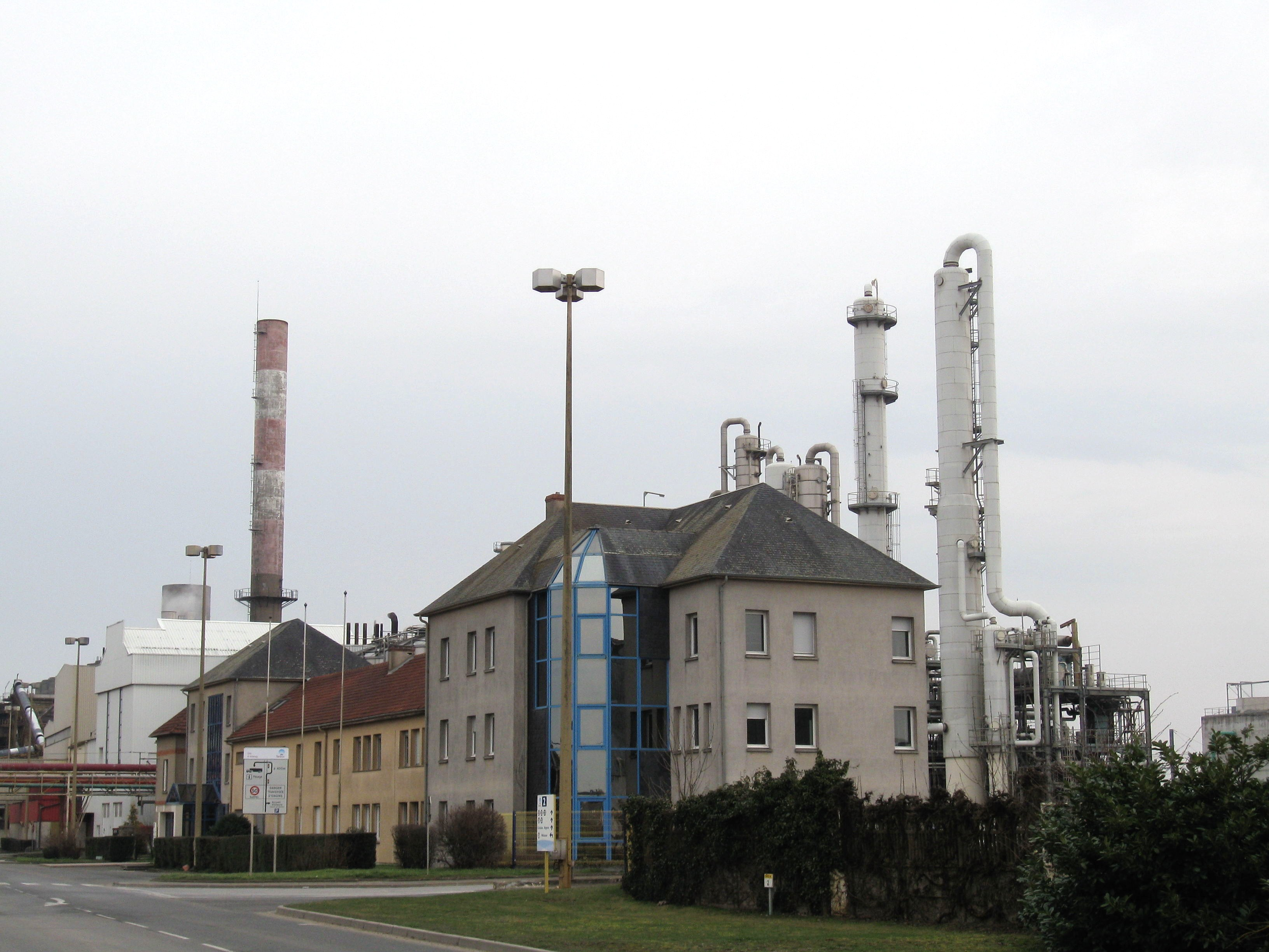 Sucrerie d'Artenay (Tereos), Artenay, Loiret, France